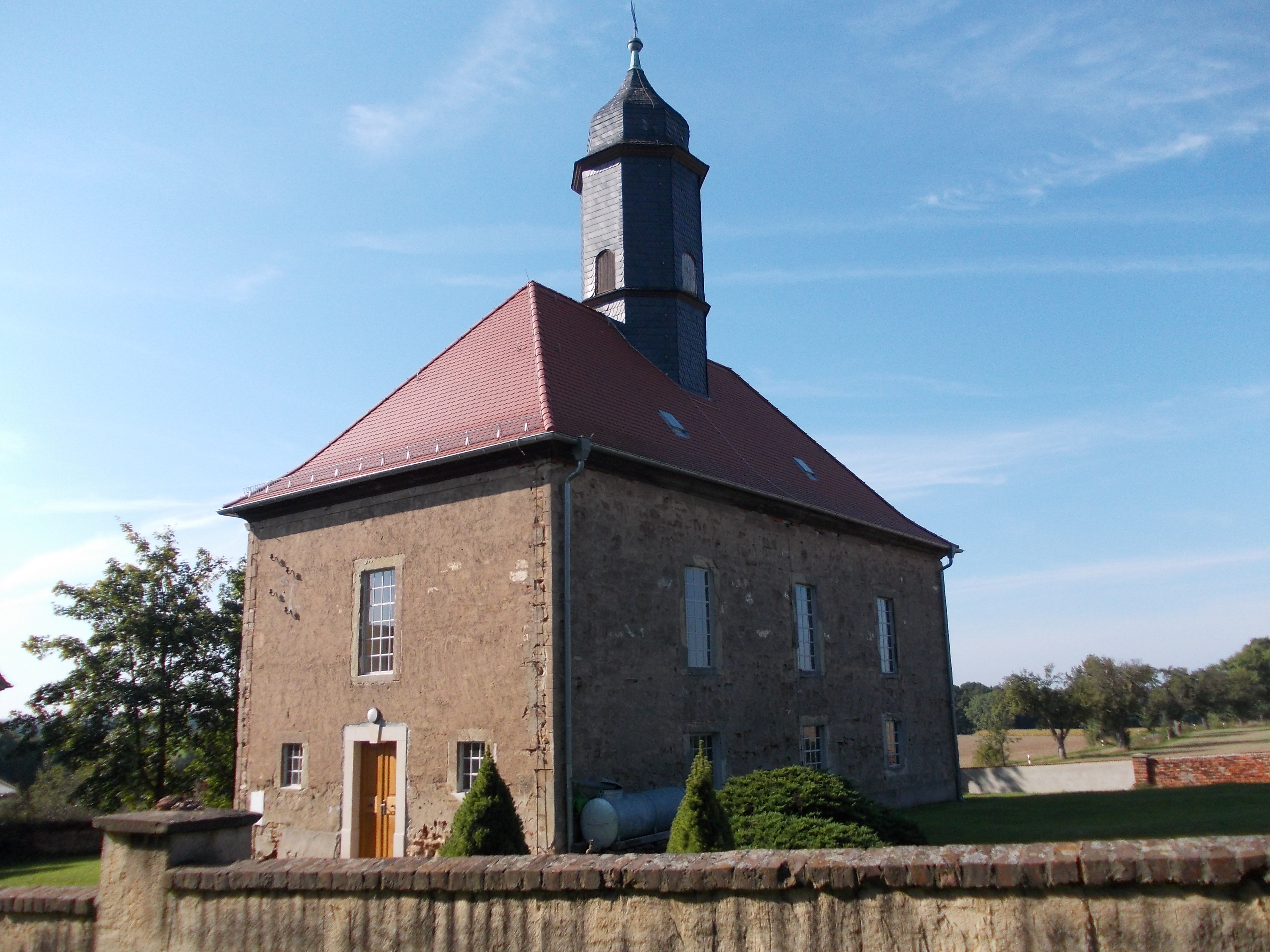 Kirche Hartroda (Gemeinde Wildenbörten)